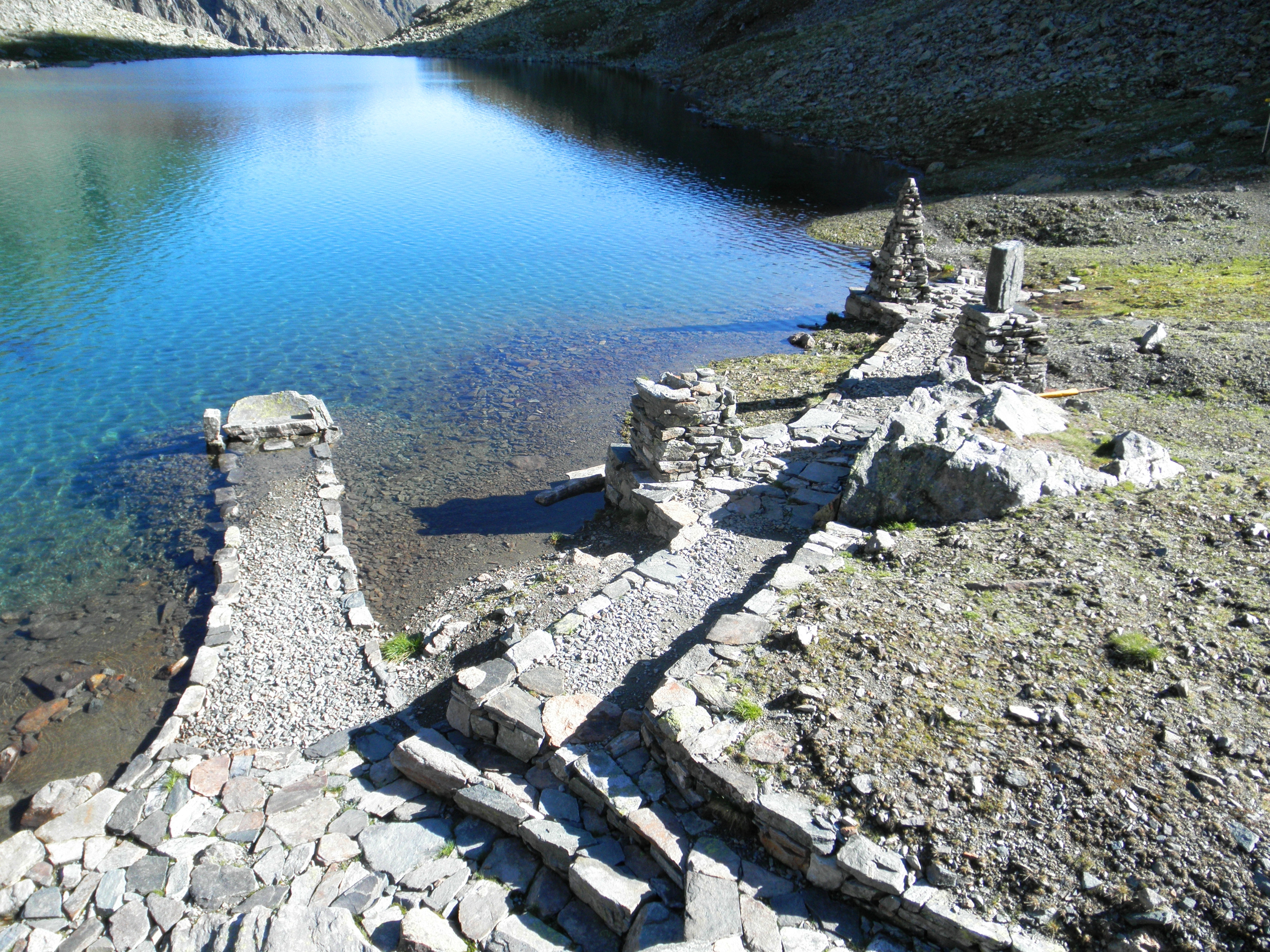 Blick vom der Kuppel des Apollontempels am Hundstalsee (Österreich) auf den Steg und Säulengang.